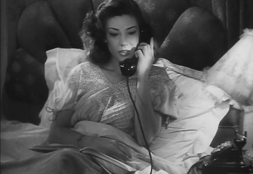 screen from Italian film Roma città aperta, 1945.